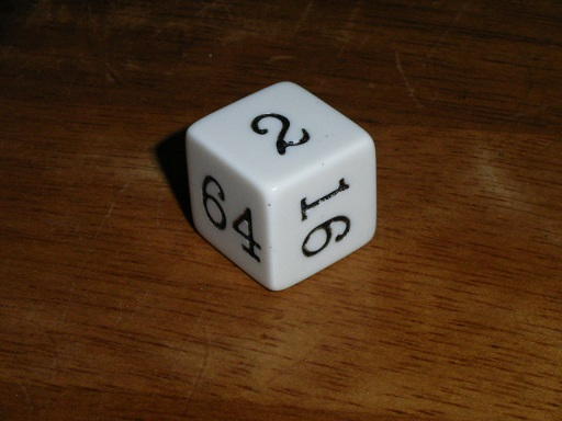 バックギャモンボード付属のダブリングキューブ